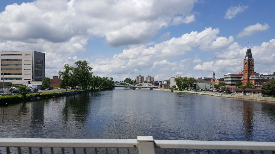 모이라강 옆에 위치한 벨빌시청